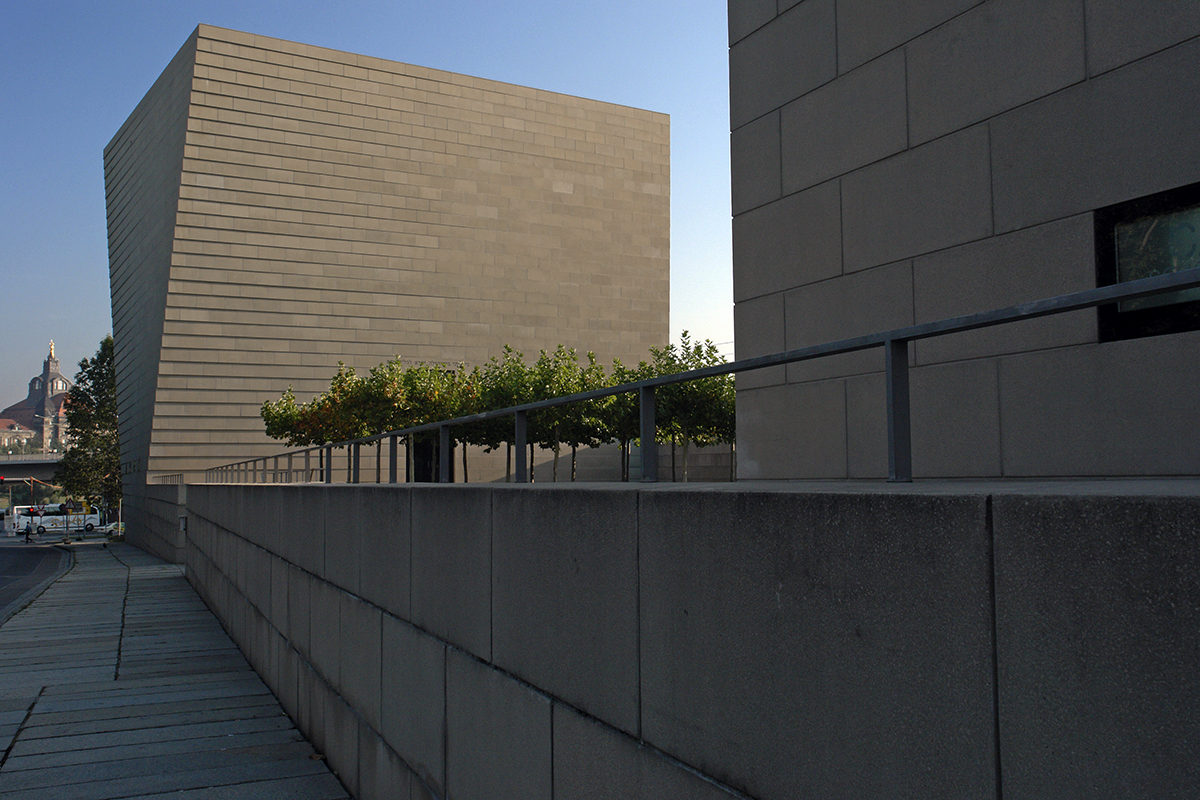 Synagoge Dresden, Blick entlangs des Hasenbergs zur Elbe